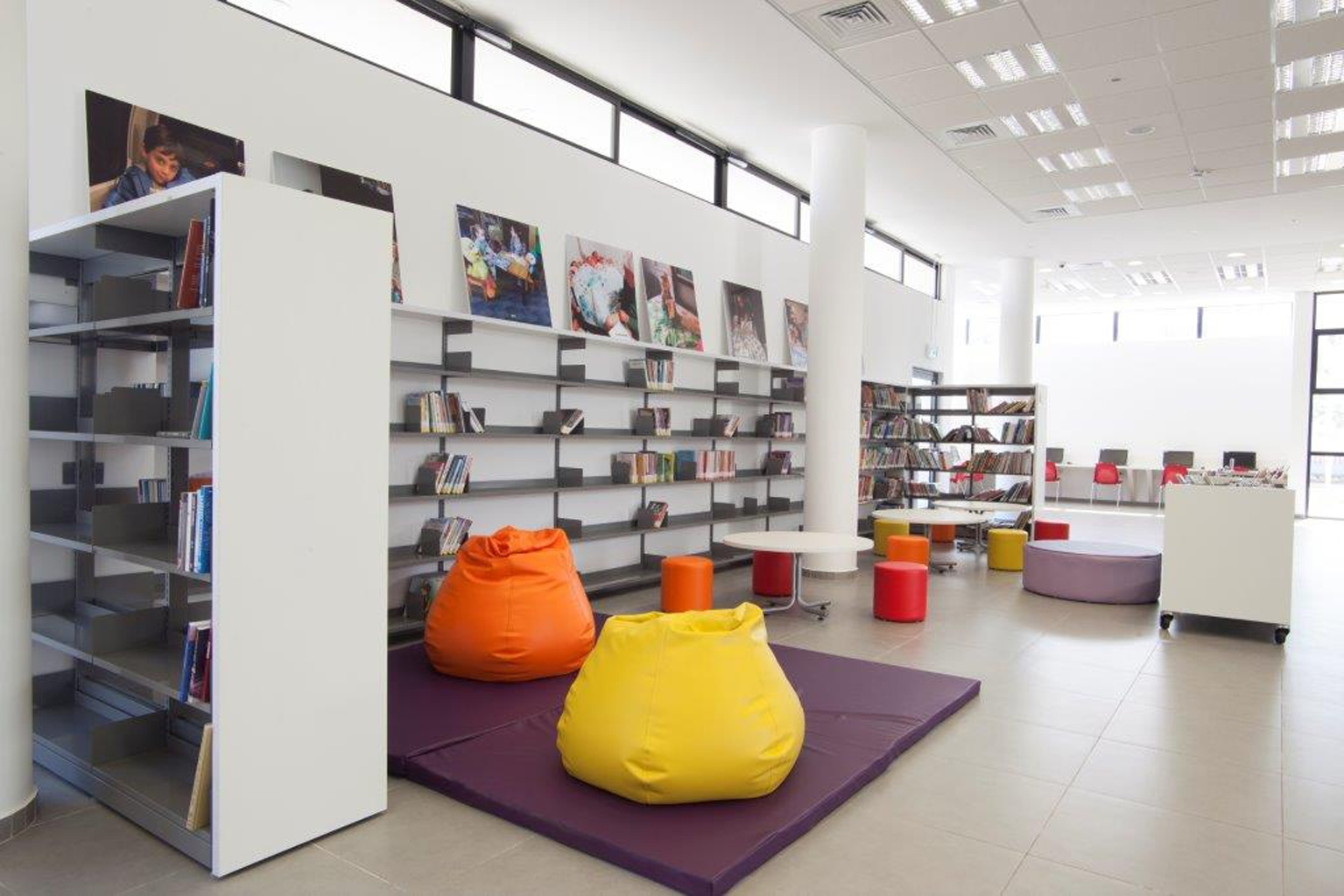 ספרייה קהילתית גבעת-אולגה